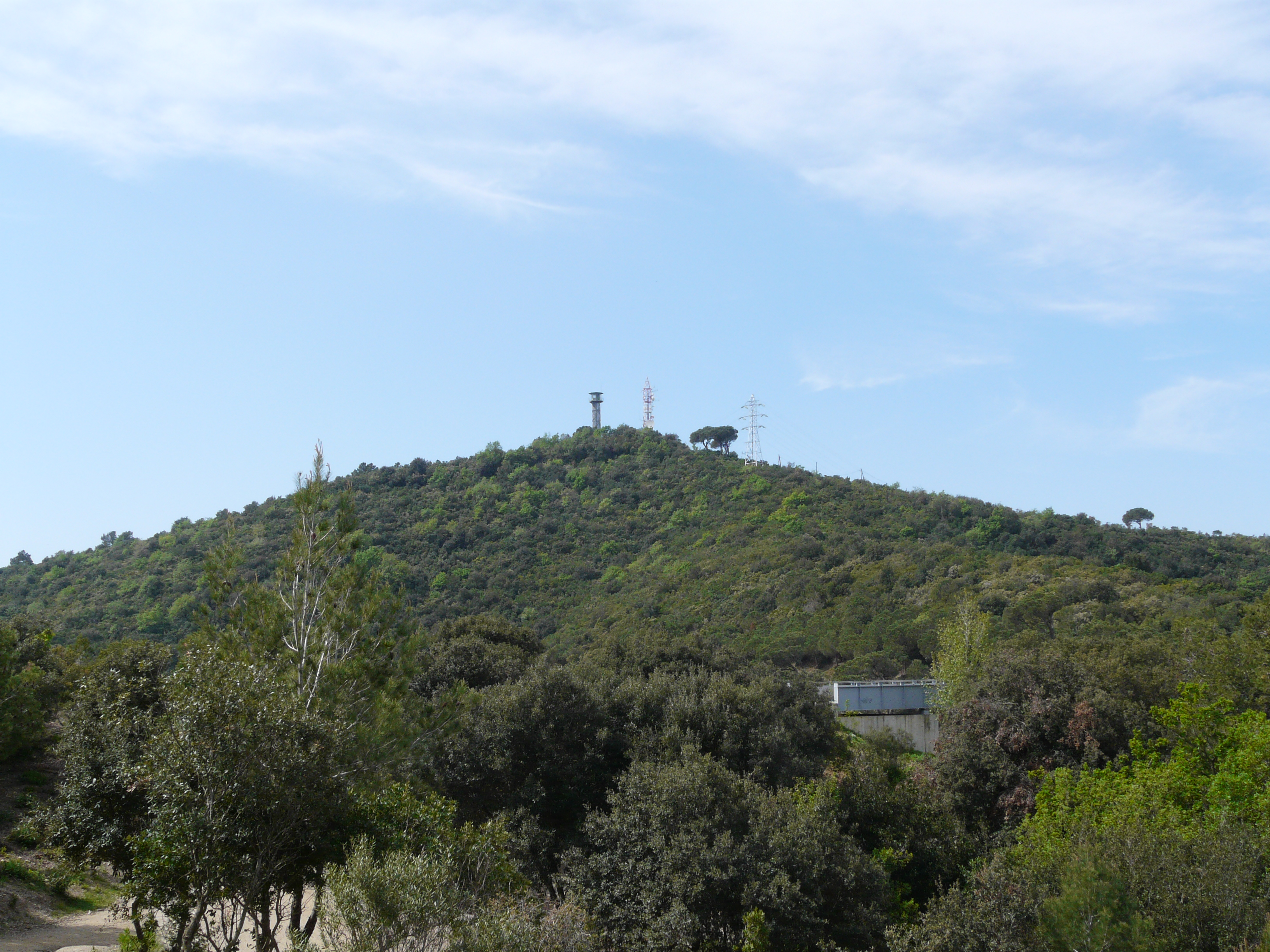 Serra de Collserola (Vallès Occidental, Baix Llobregat, Barcelonès) (Sant Cugat del Vallès, Barcelona, Cerdanyola del Vallès i altres). This is a a photo of a natural area in Catalonia, Spain, with id: ES510066 Object location41° 26′ 24″ N, 2° 06′ 36″ E